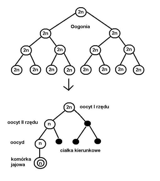 Oogeneza